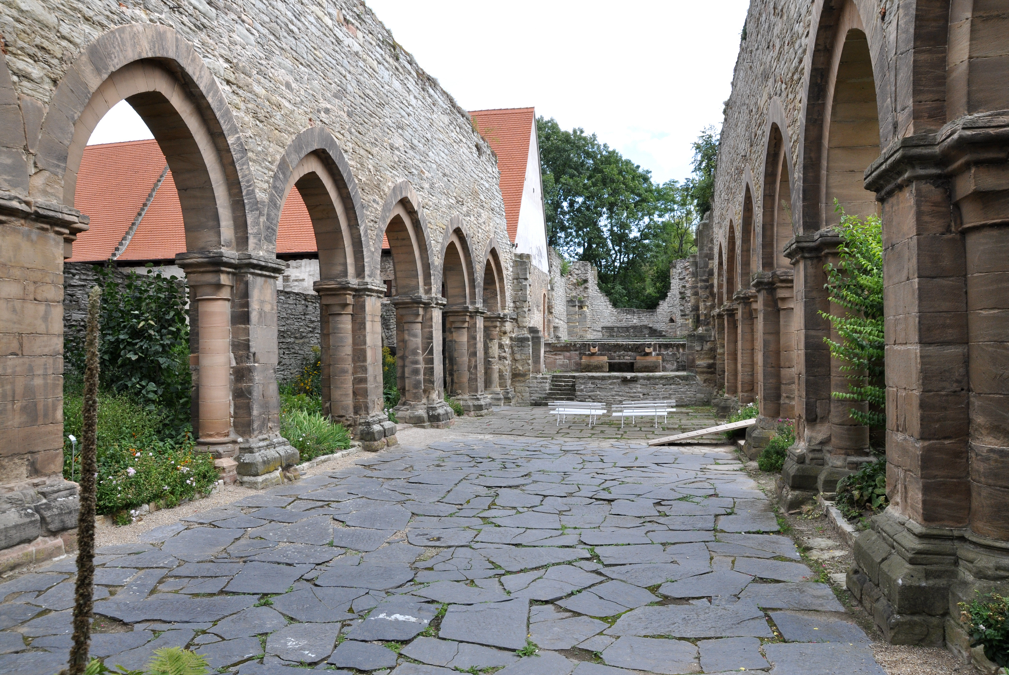 Blick durch das Mittelschiff nach Osten